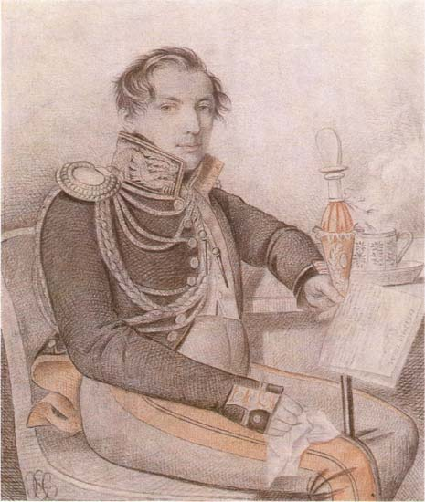 Коновницын Петр Петрович (1802-1830)